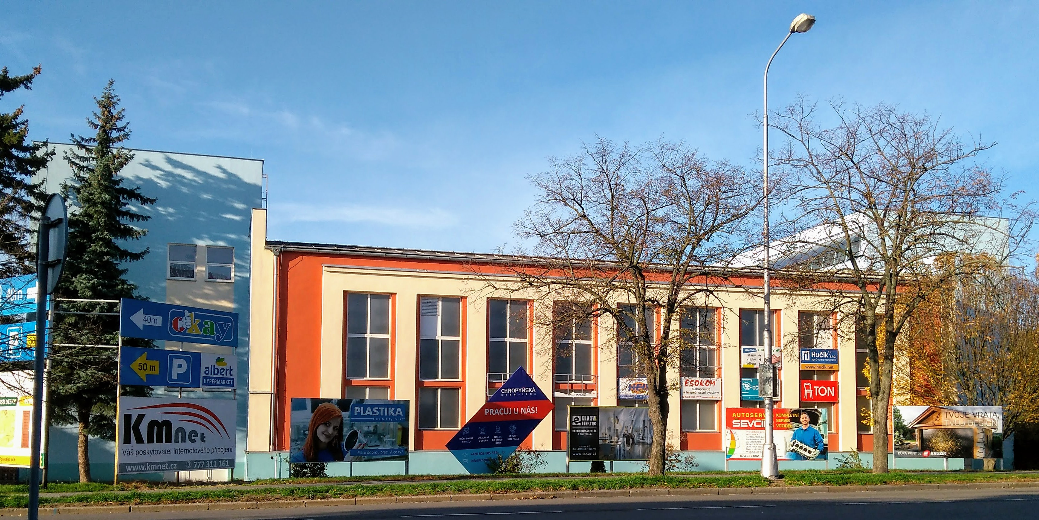 Tělocvična TJ Slavia Kroměříž, Kotojedská 2590